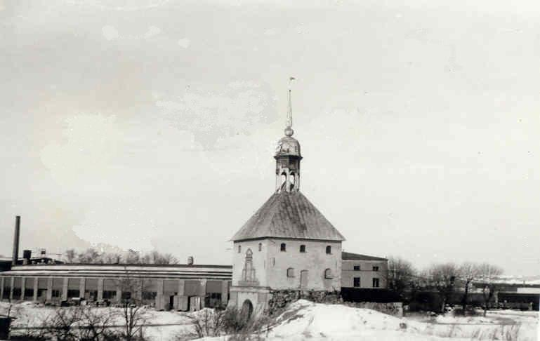 Johannisborgs slottsruin i Norrköping, omkring år 1985. En bild tagen av Harri Blomberg.